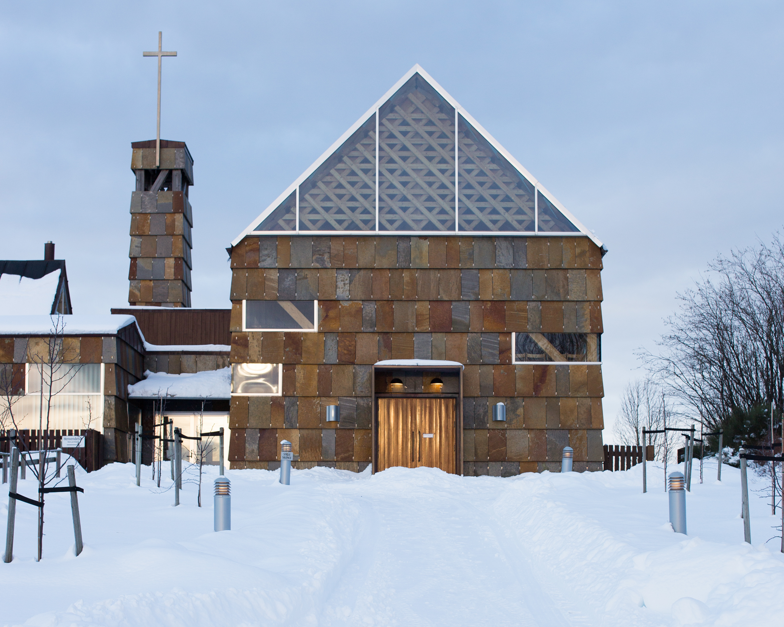 Tautra Mariakloster på vinteren. Tegnet av Jensen & Skodvin arkitektkontor